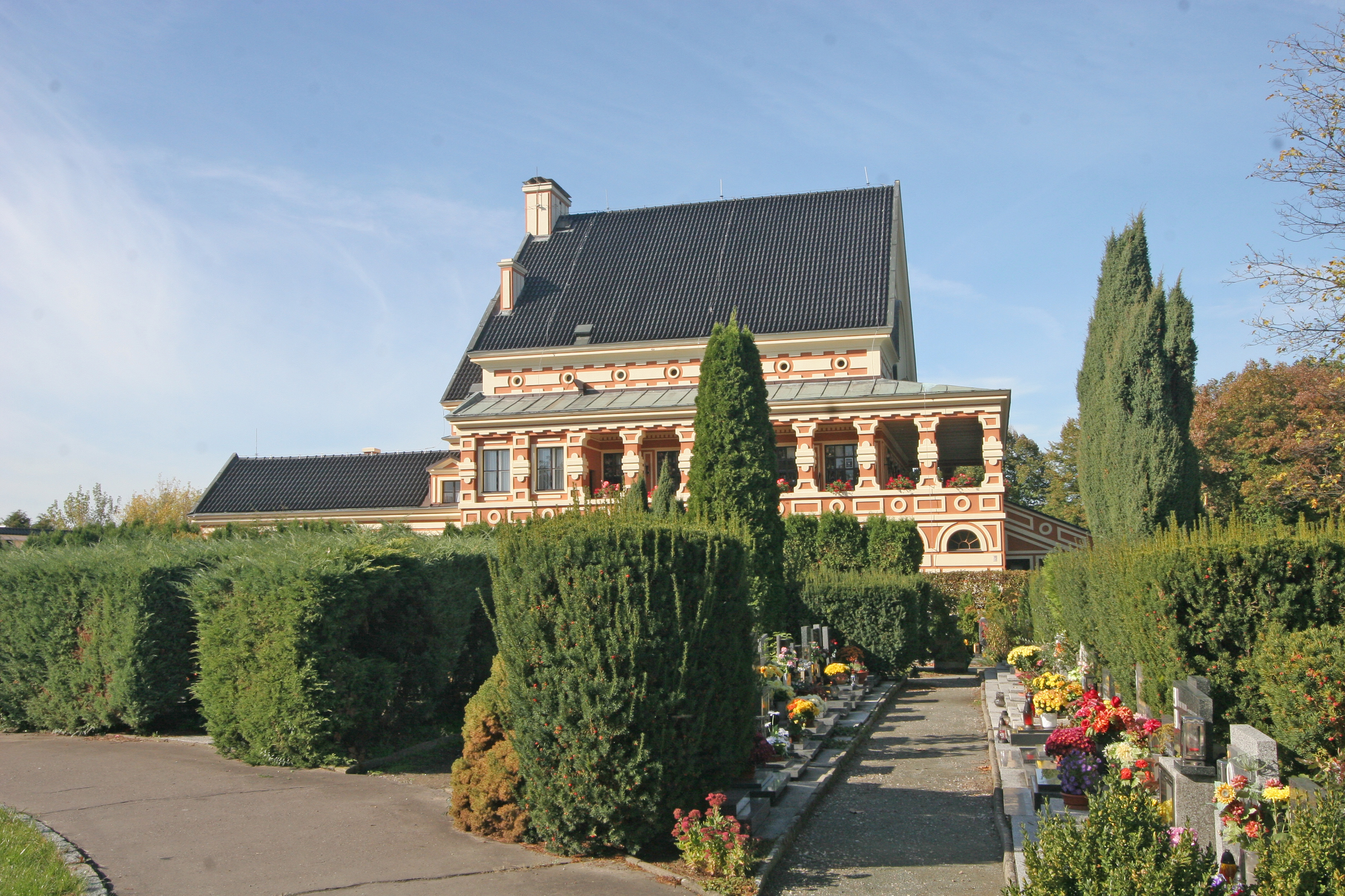 Krematorium, Pod břízkami 990, Pardubice